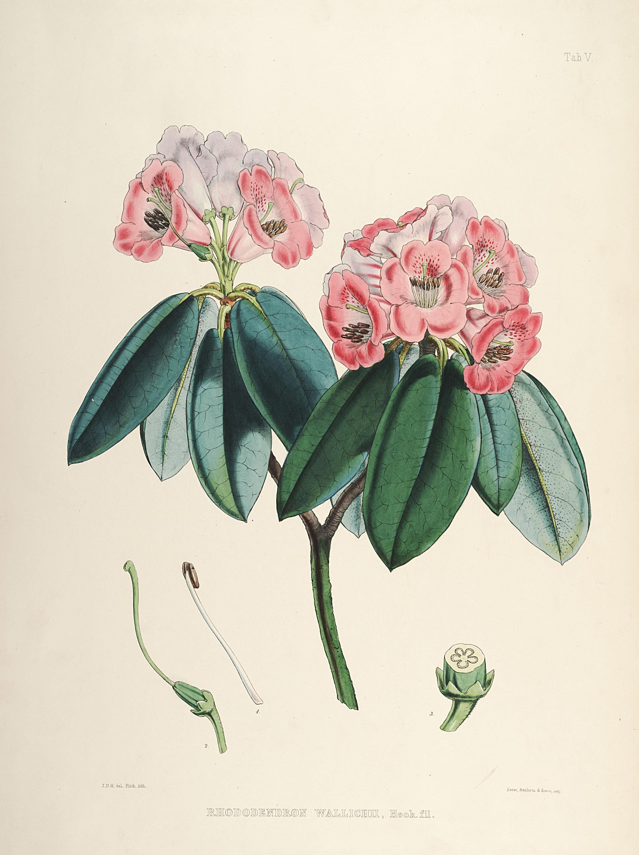 cii.V J^DH.aeL Ji'itdh. JittL. Jittf^e, fienhaiji, i Jty.'rf^ ..ji^ , d: o: '^ fAILILE€M 7 ®© A